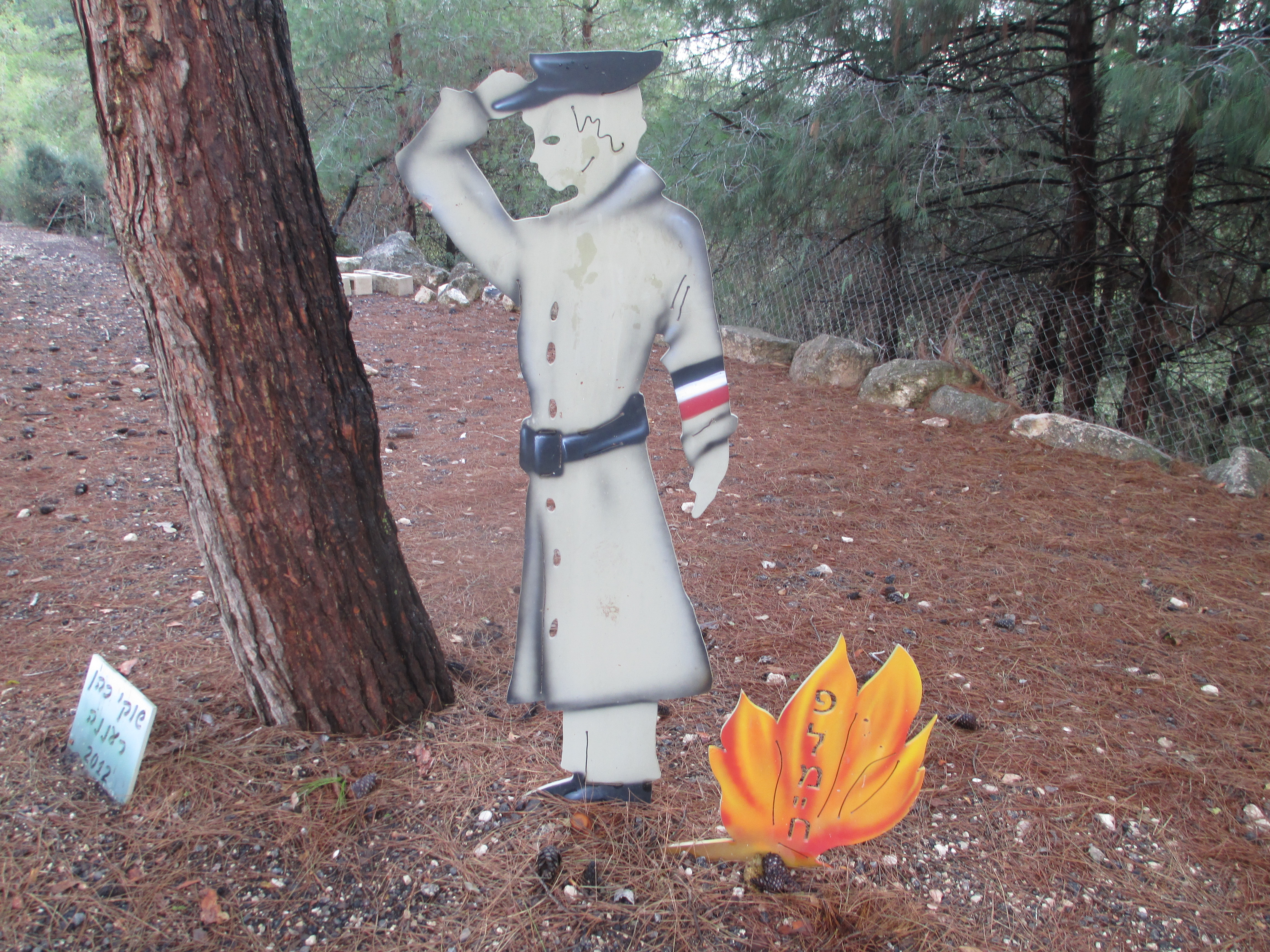 פסל מדורות הפלמ"ח - המחלקה הגרמנית